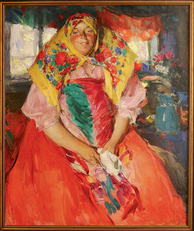 Коллекция Беккерманов.